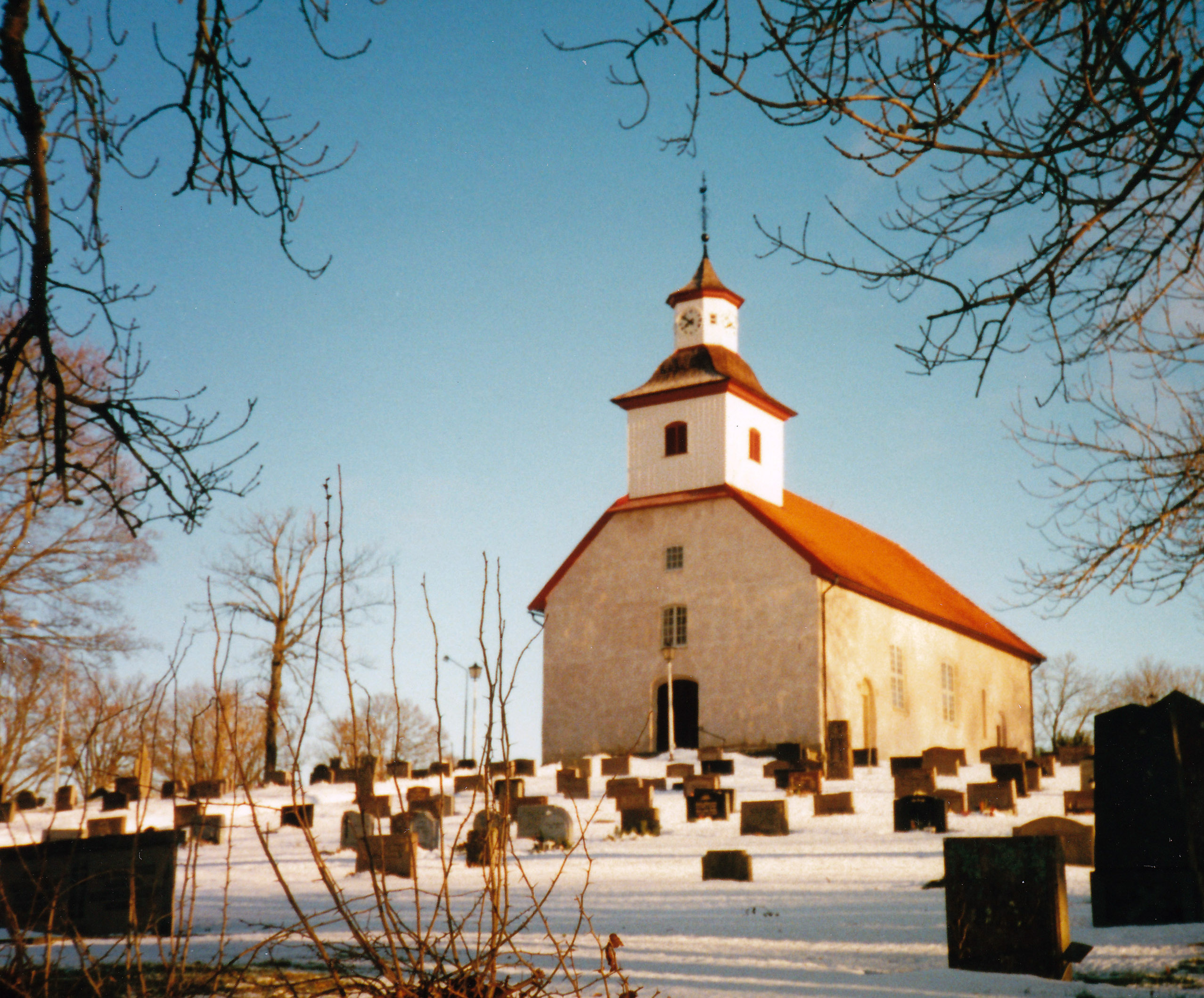 Lugnås kyrka.